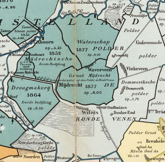 Groot Mijdrecht